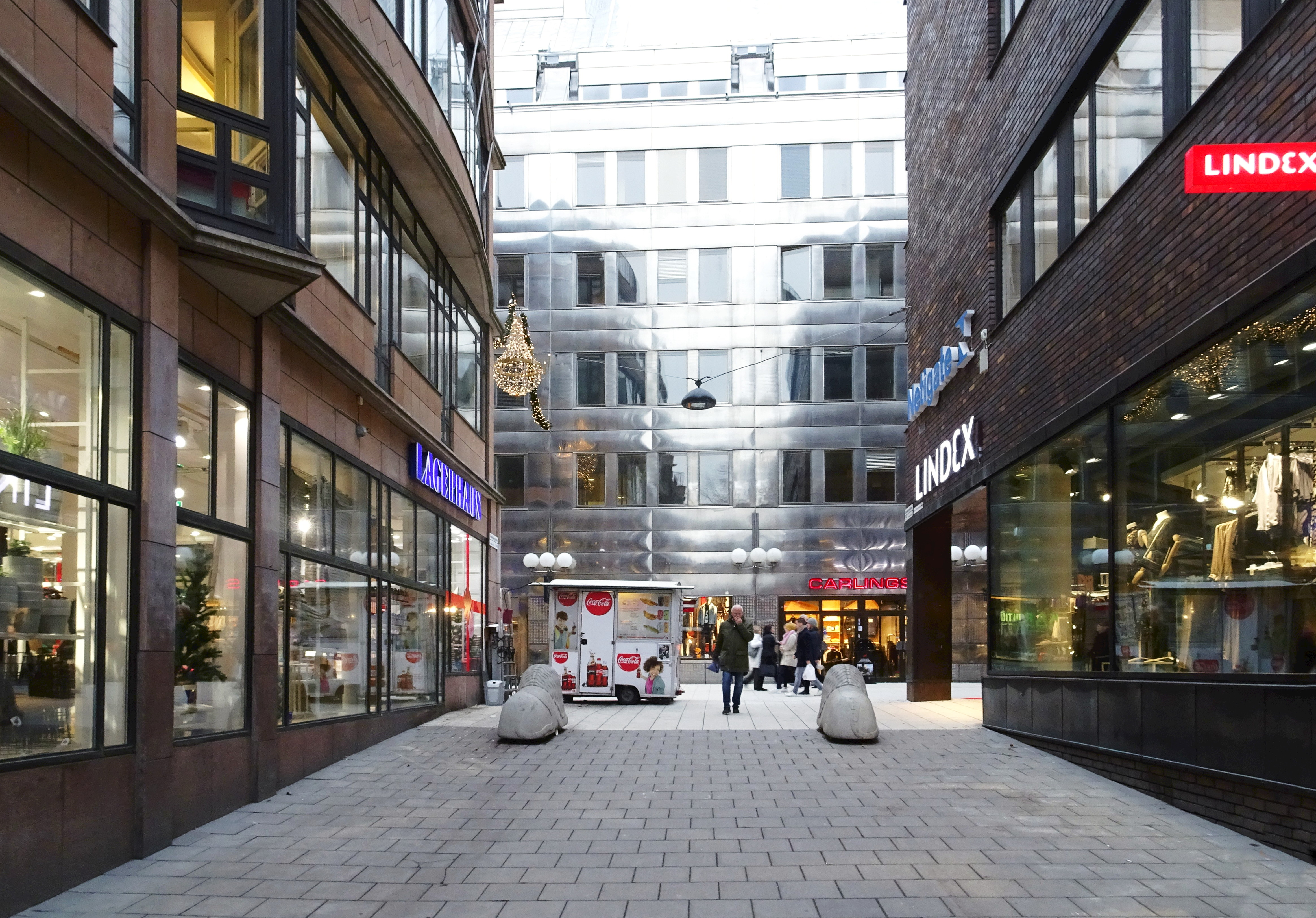 Brunkebergsgatan mot norr, Sparbankernas hus t.h. och Klarahuset t.v.